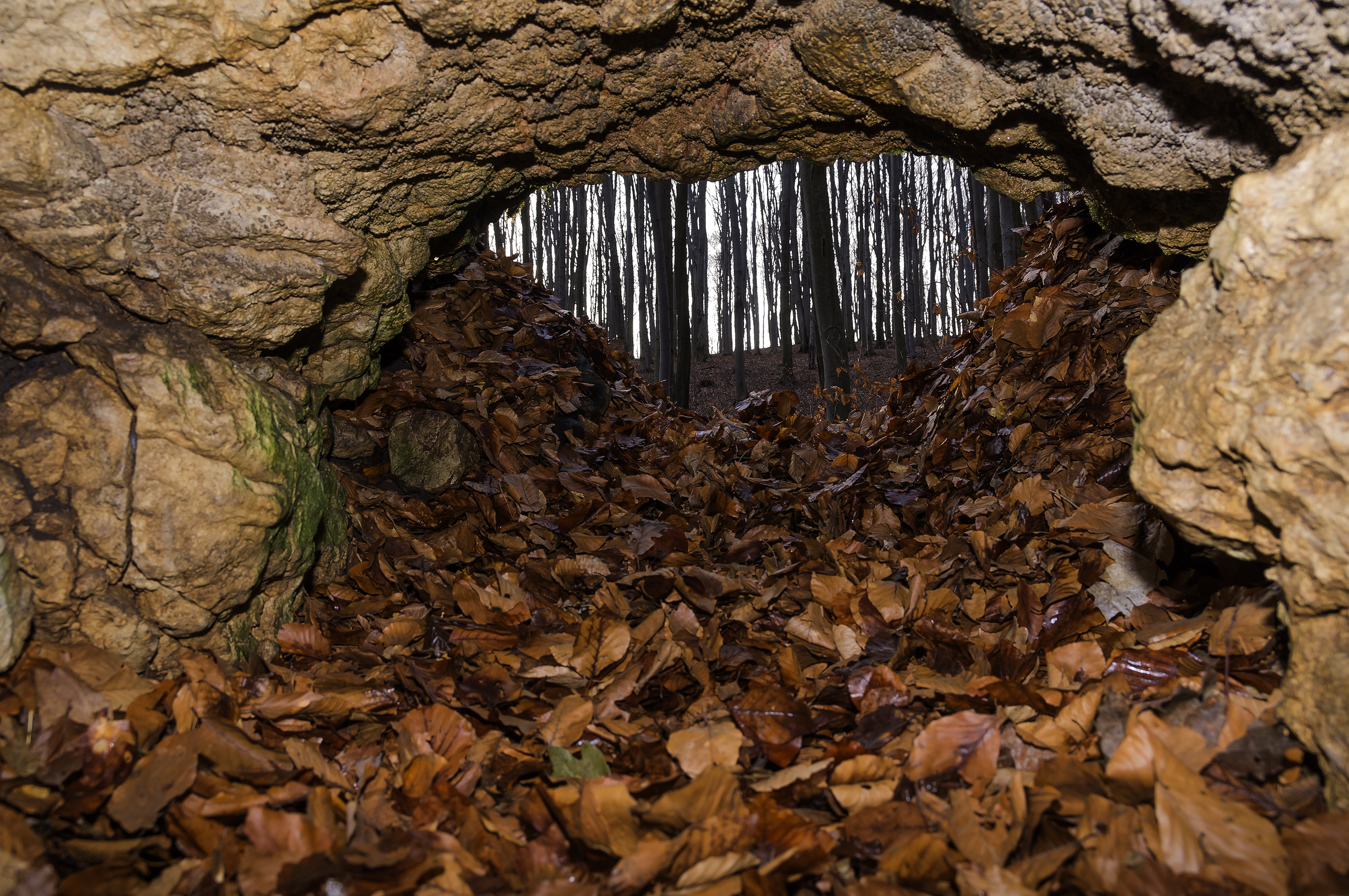 Jaskinia bez Nazwy w Wąwozie Żarskim